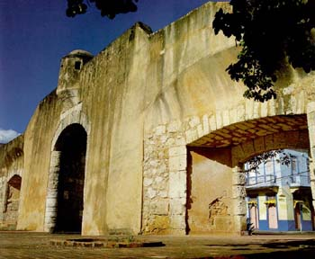 Puerta de la Misericordia, Santo Domingo, República Dominicana